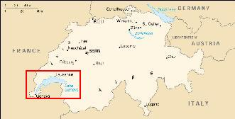 Kaart van Zwitserland van CIA World Factbook, enkel verkleind en Meer van Geneve ruwweg met rood gemarkeerd